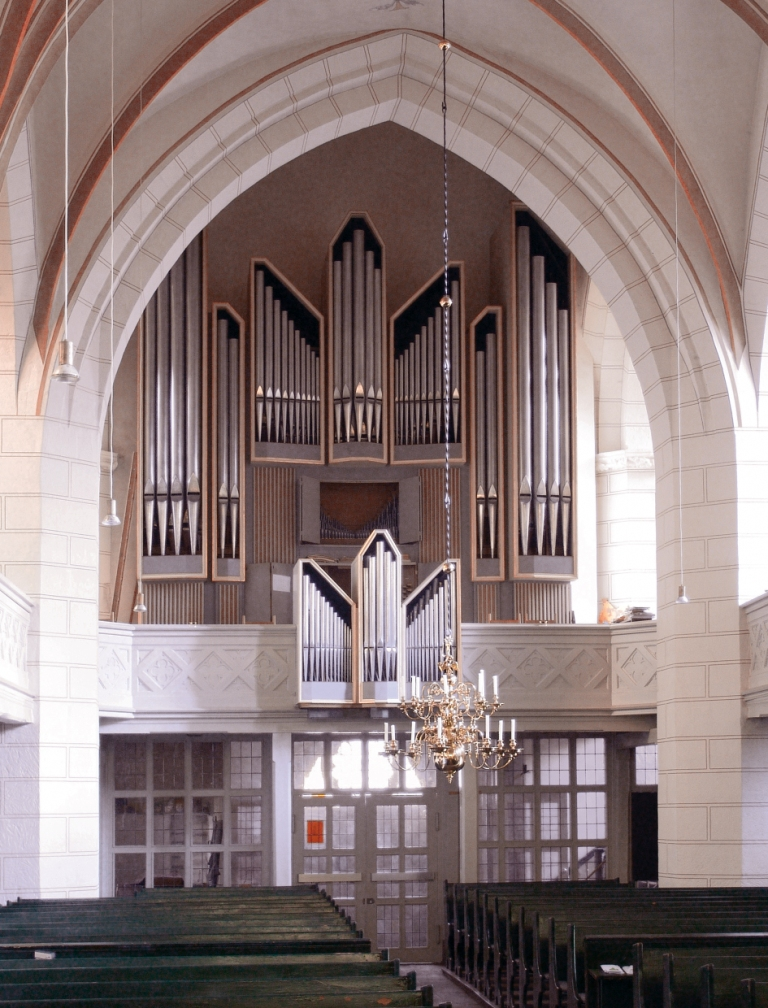 Orgel in Göttingen, St. Albani